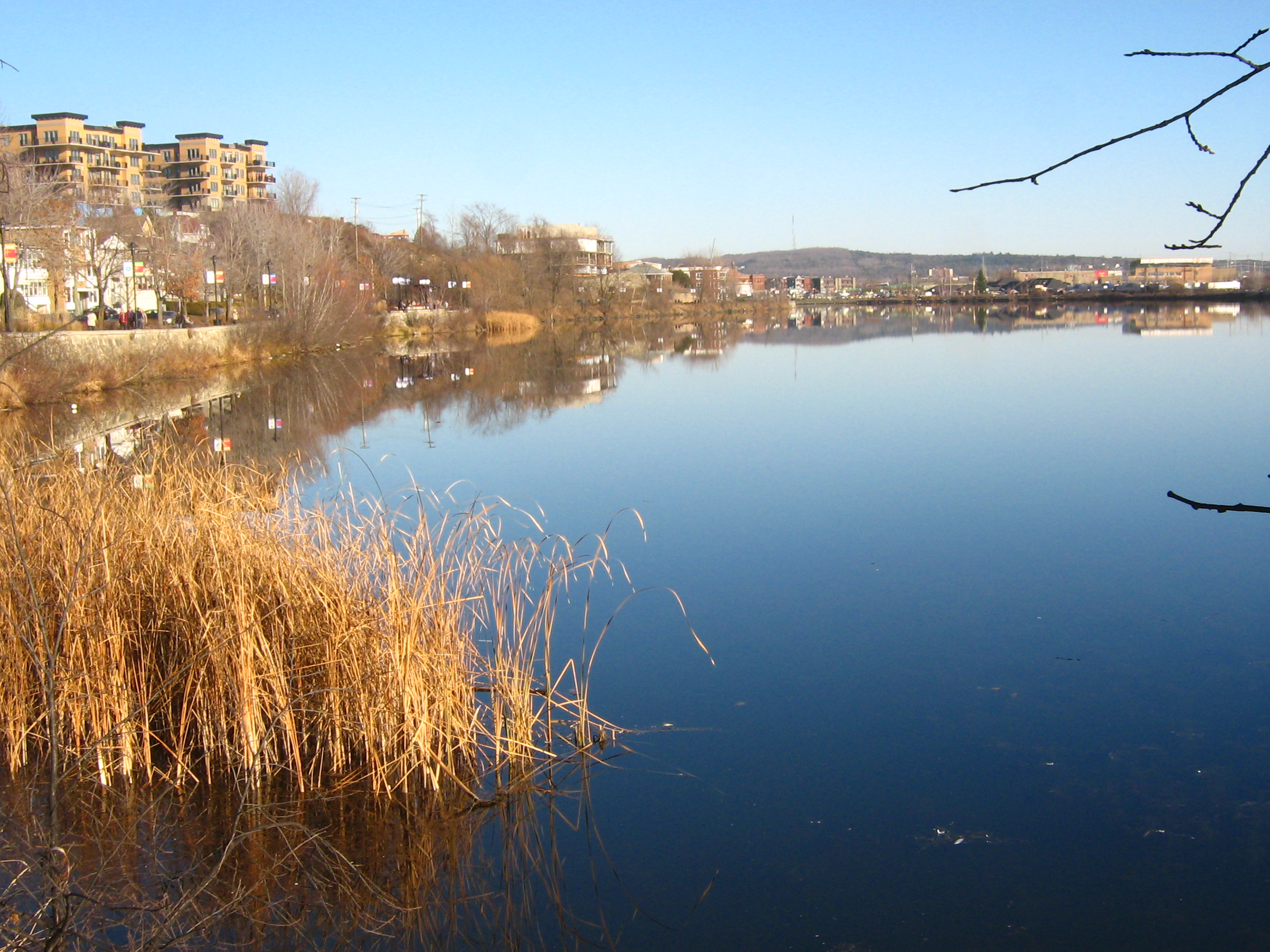 Le lac des Nations